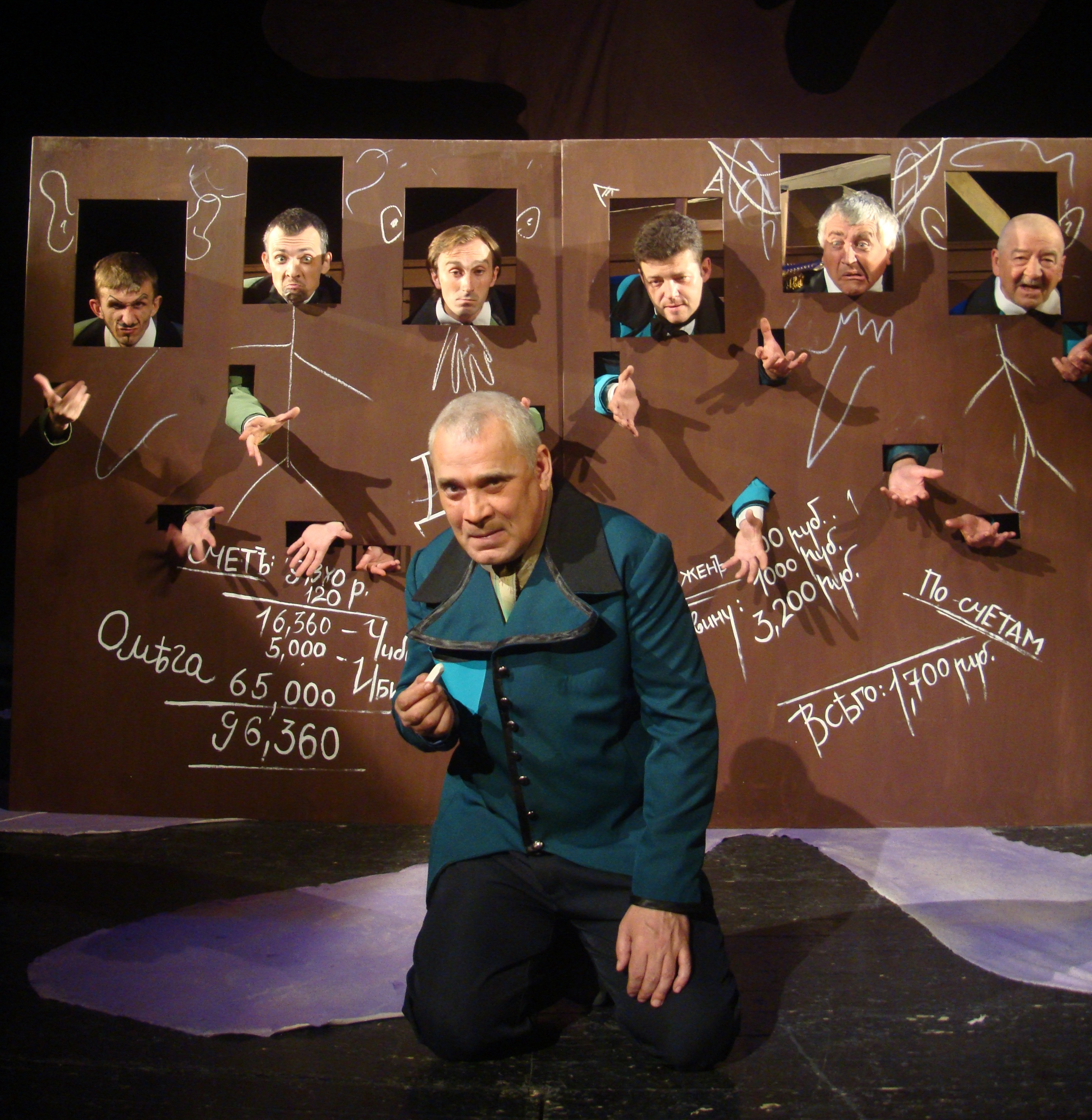 СМЕРТЬ ТАРЕЛКИНА. А. Сухово-Кобылин режиссёр Евгений Тыщук